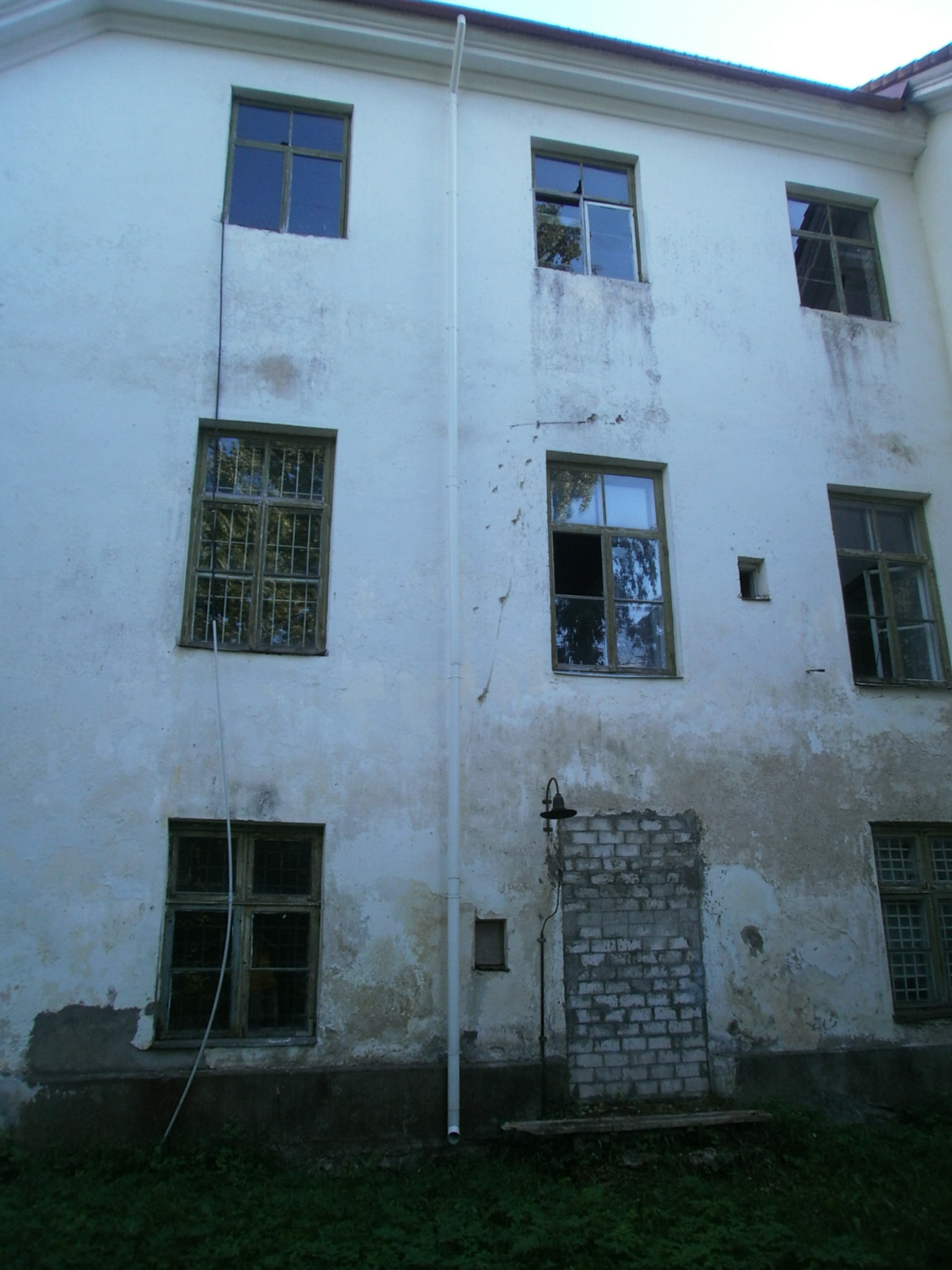 Kunagise vahepeal kasutuses olnud peasissekäigu asukoht.